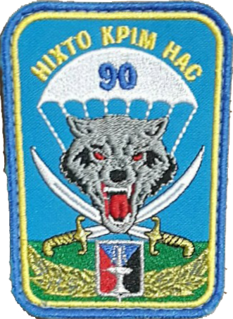 Нарукавний знак, 90-й окремий аеромобільний батальйон